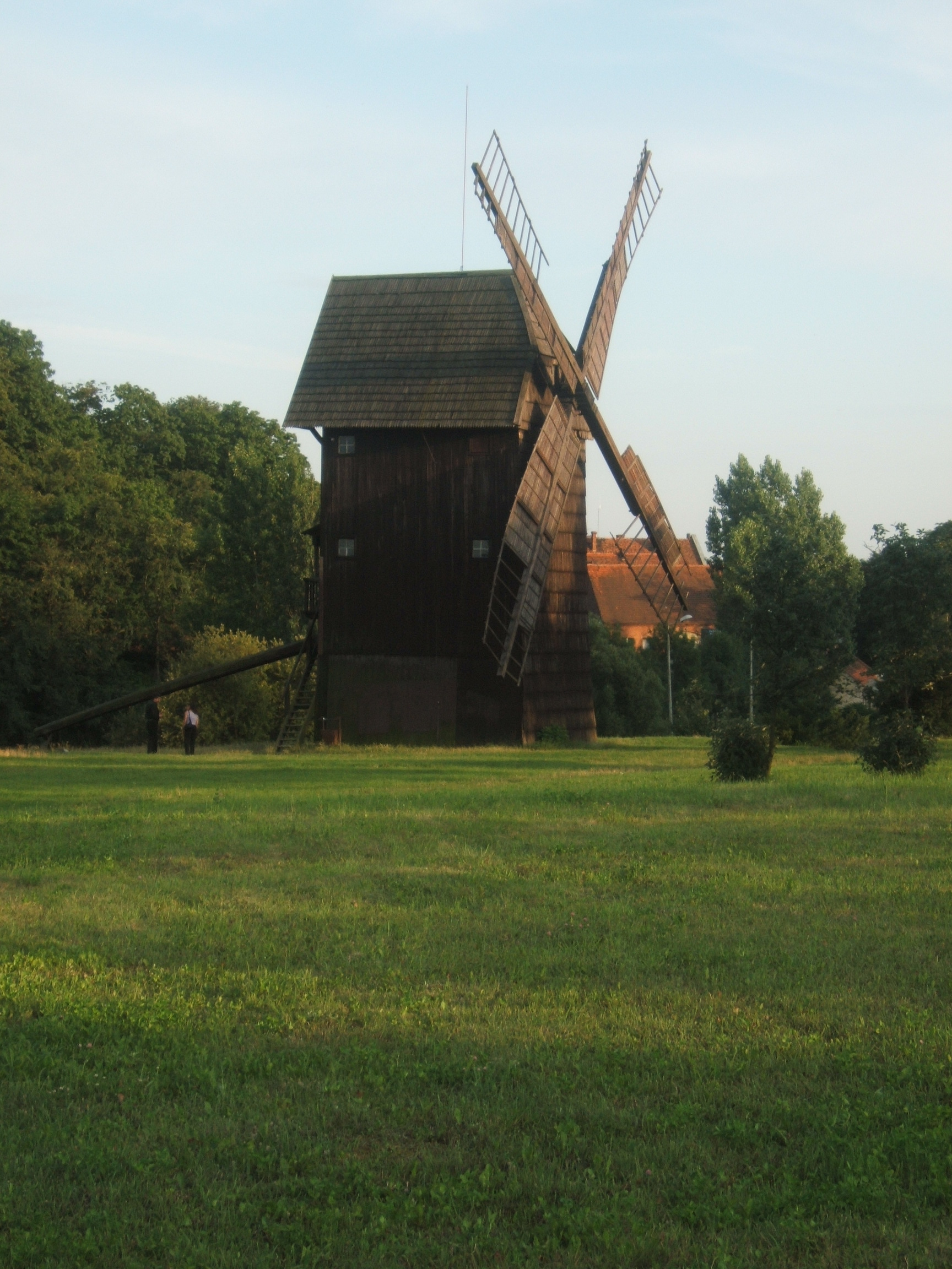 Widok jednego z dwóch zrekonstruowanych wiatraków, przypominających tradycje młynarskie.